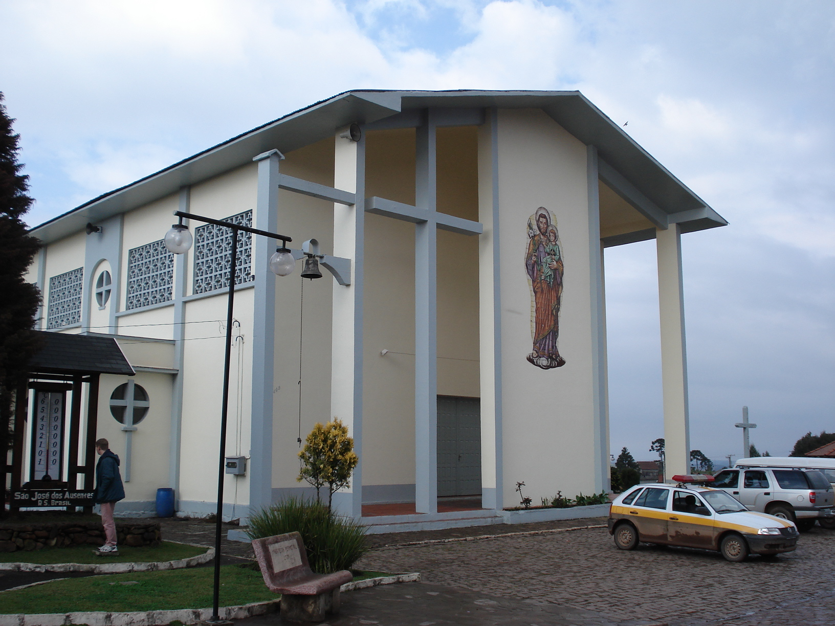 Igreja em São José dos Ausentes